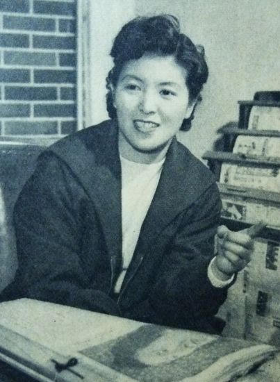 山下艶子